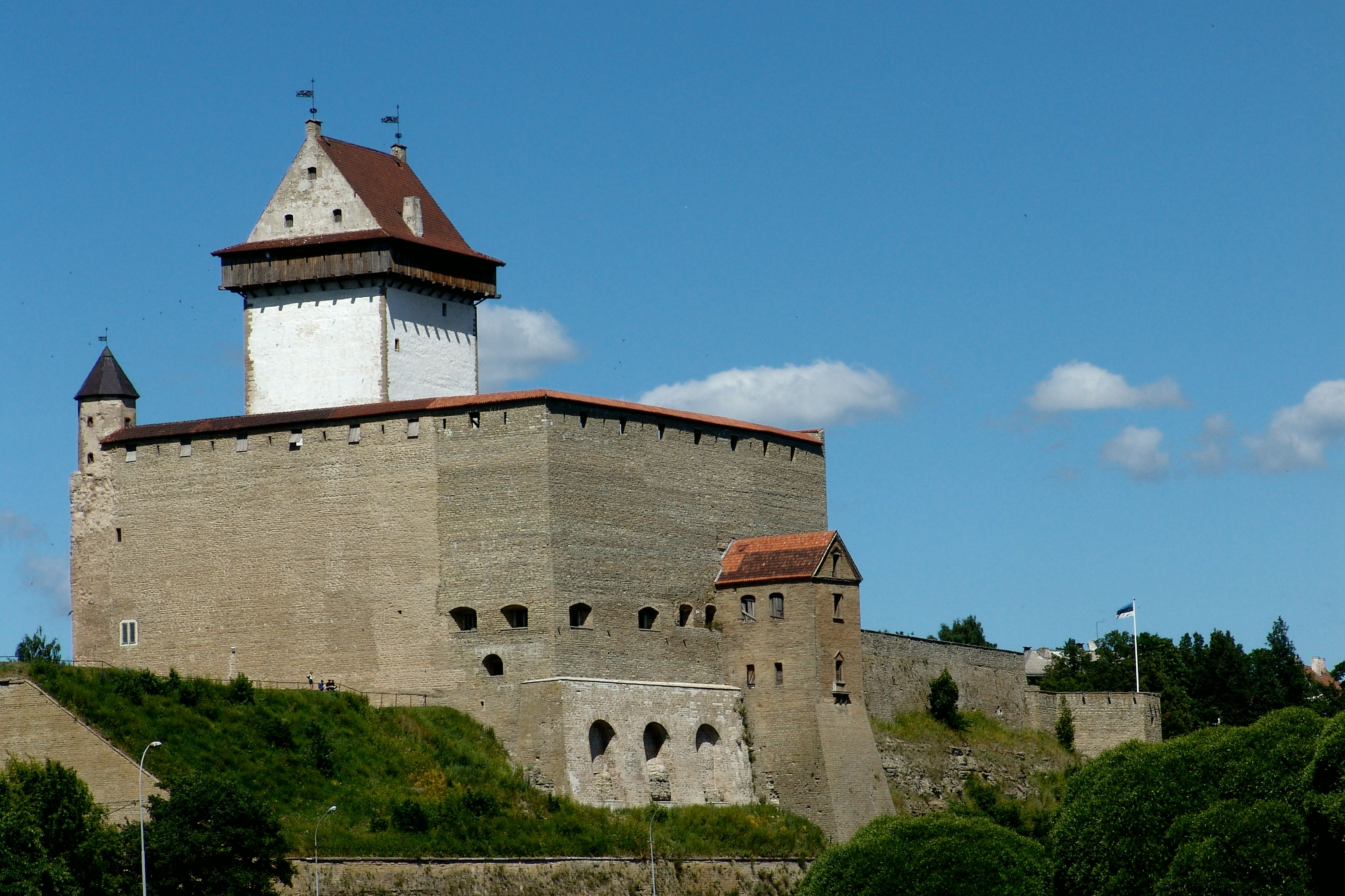 Нарвский замок